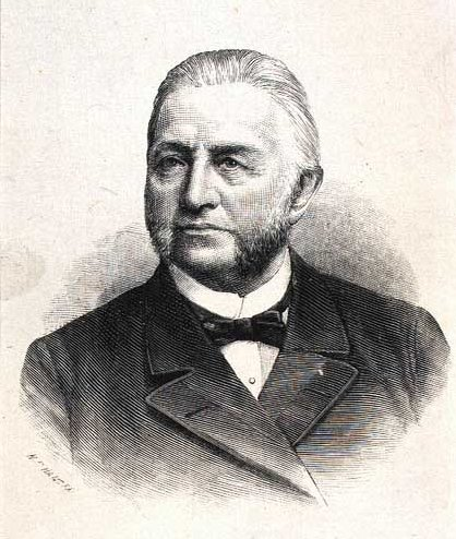 Hans Broge (4.12.1822-25.3.1908), dansk købmand